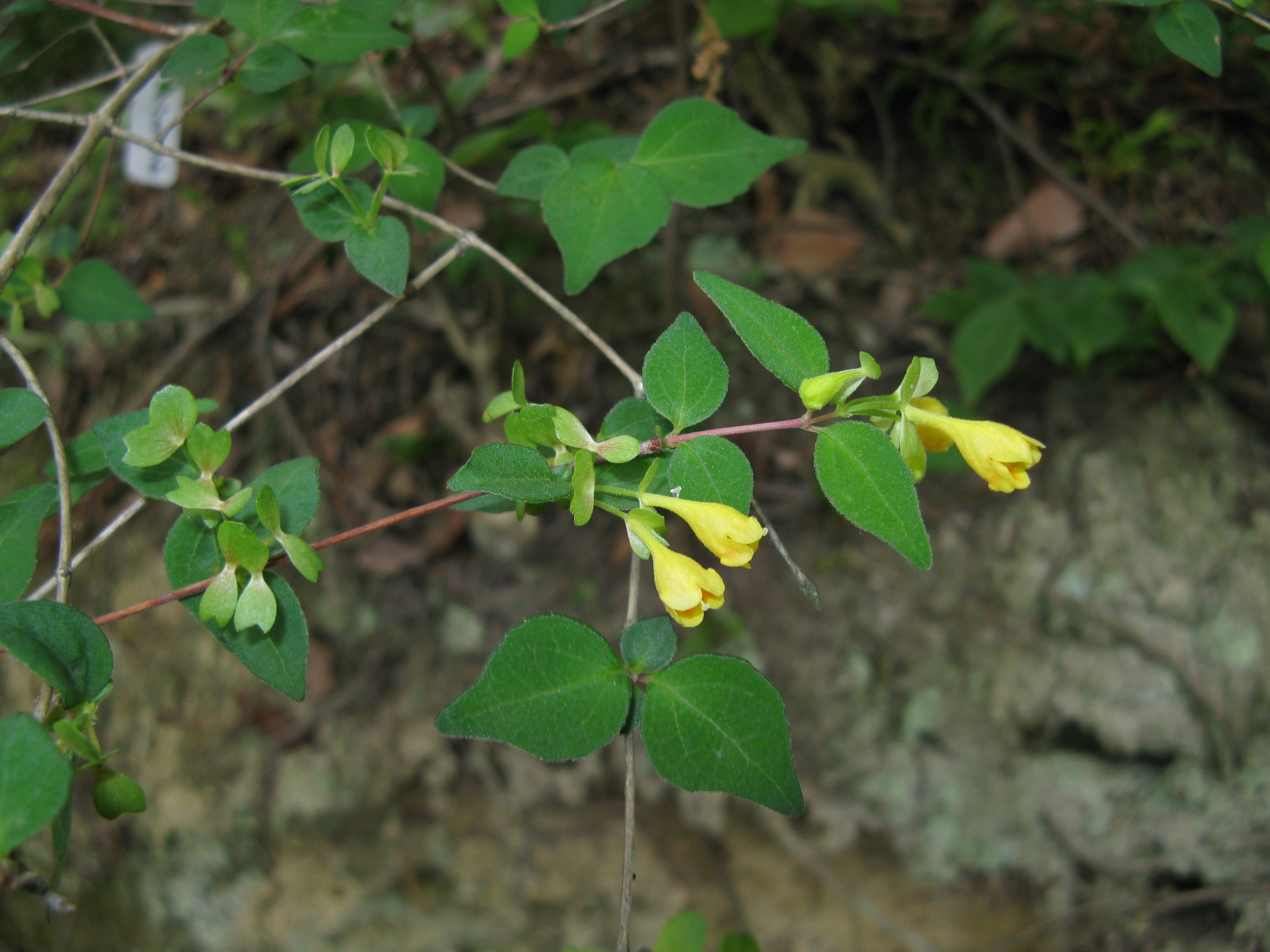 Abelia serrata